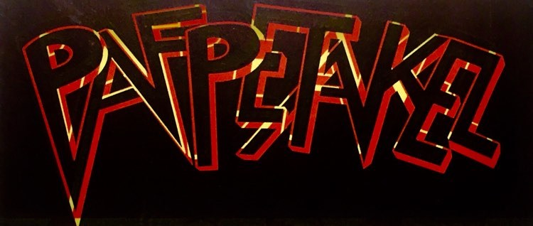 I forbindelse med udgivelsen af Pafpetakels debutplade i 1989 lavede bandet en plakat, der blev hængt op i bl.a. pladebutikker. På billedet ses et udsnit af plakaten med bandets navn.